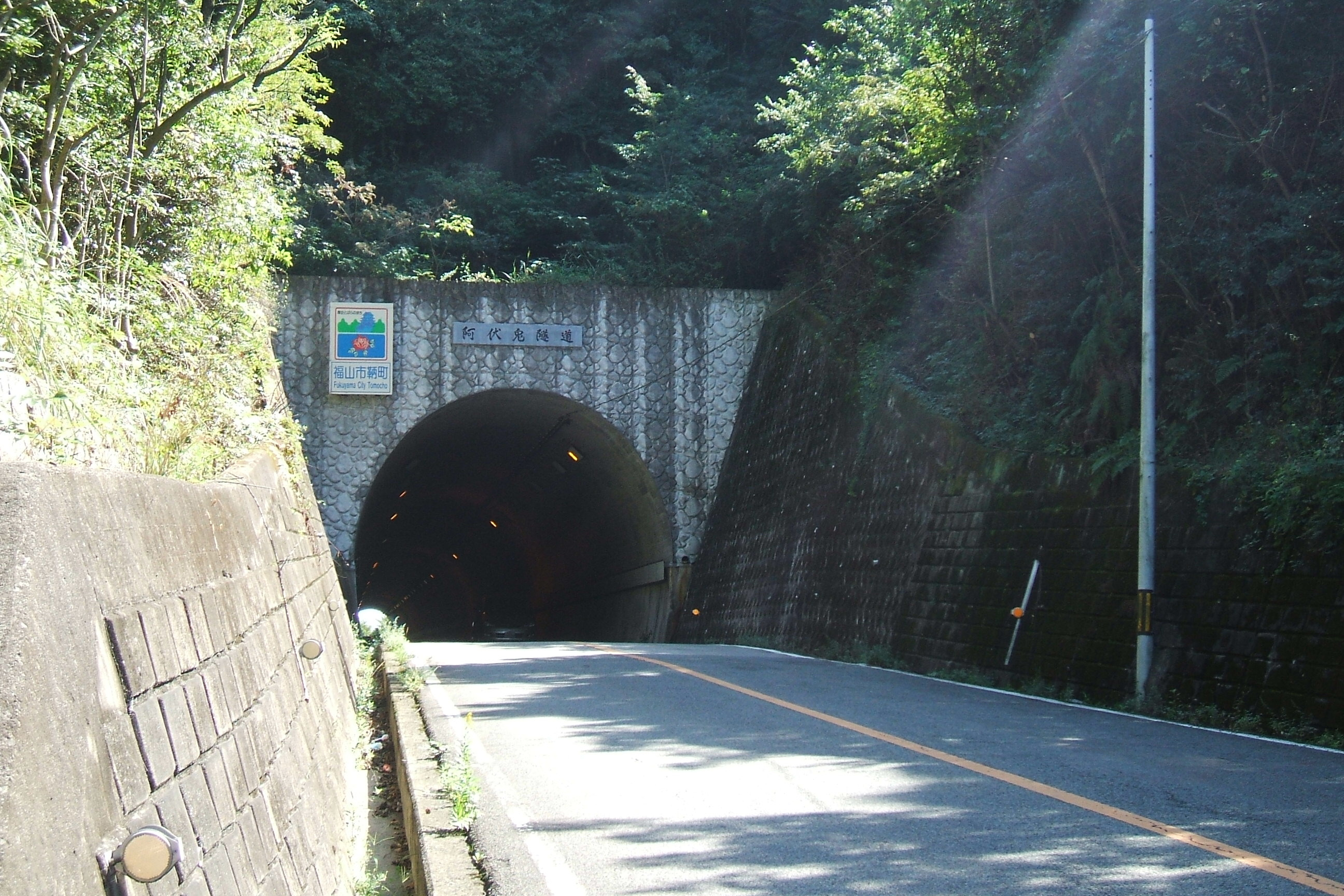 広島県福山市にある阿伏兎隧道。